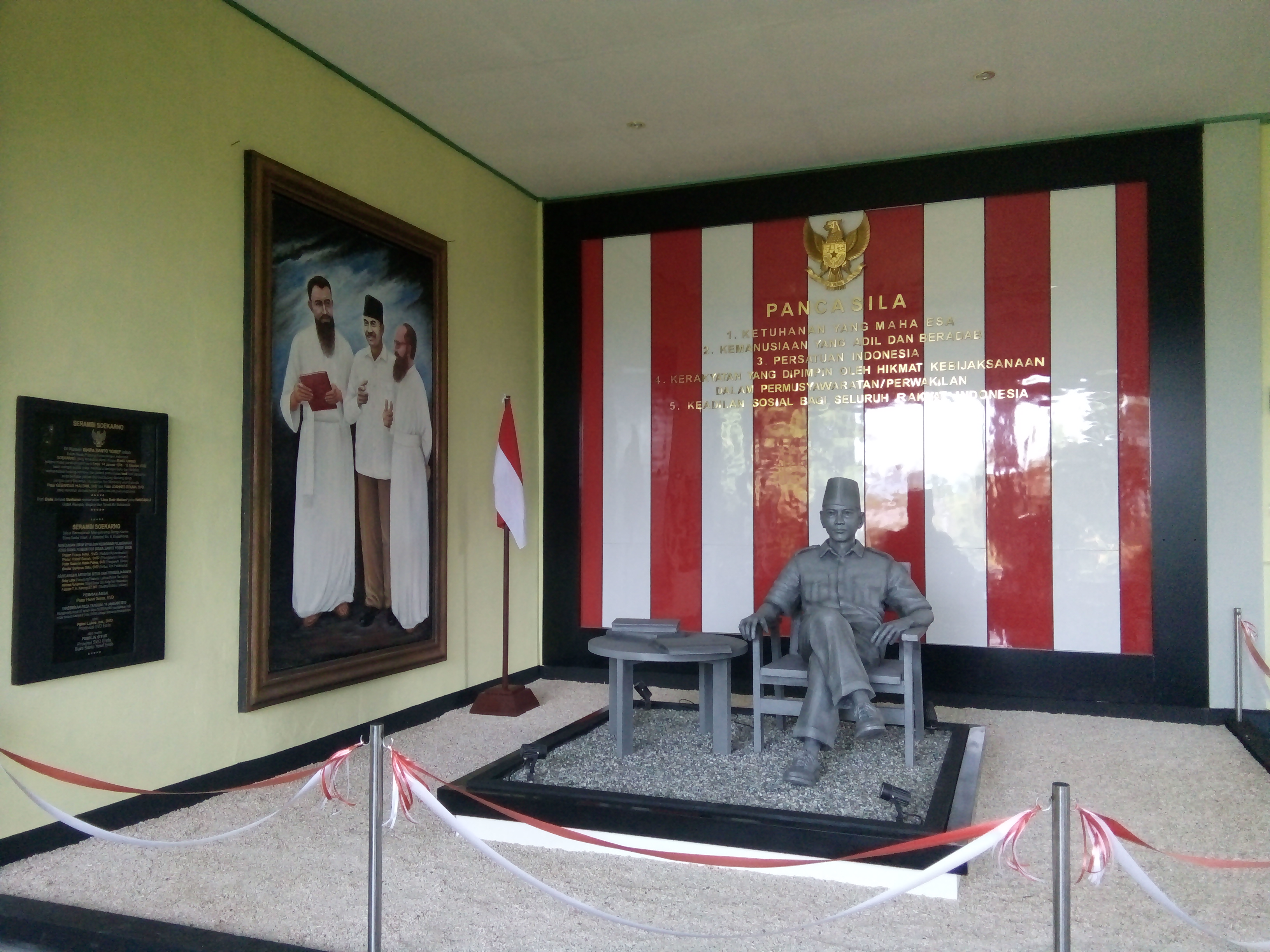 Serambi Bung Karno di Ende terletak di Biara St.Yosef Gereja Kathedral Ende Jalan Kathedral Kelurahan Kotaraja Kecamatan Ende Utara Kabupaten Ende-NTT. Seraambi Bung Karno di Ende didirikan bertujuan untuk mengenang sejarah perjuangan Bung Karno ketika masa pembuangannya di Ende 1934-1938.